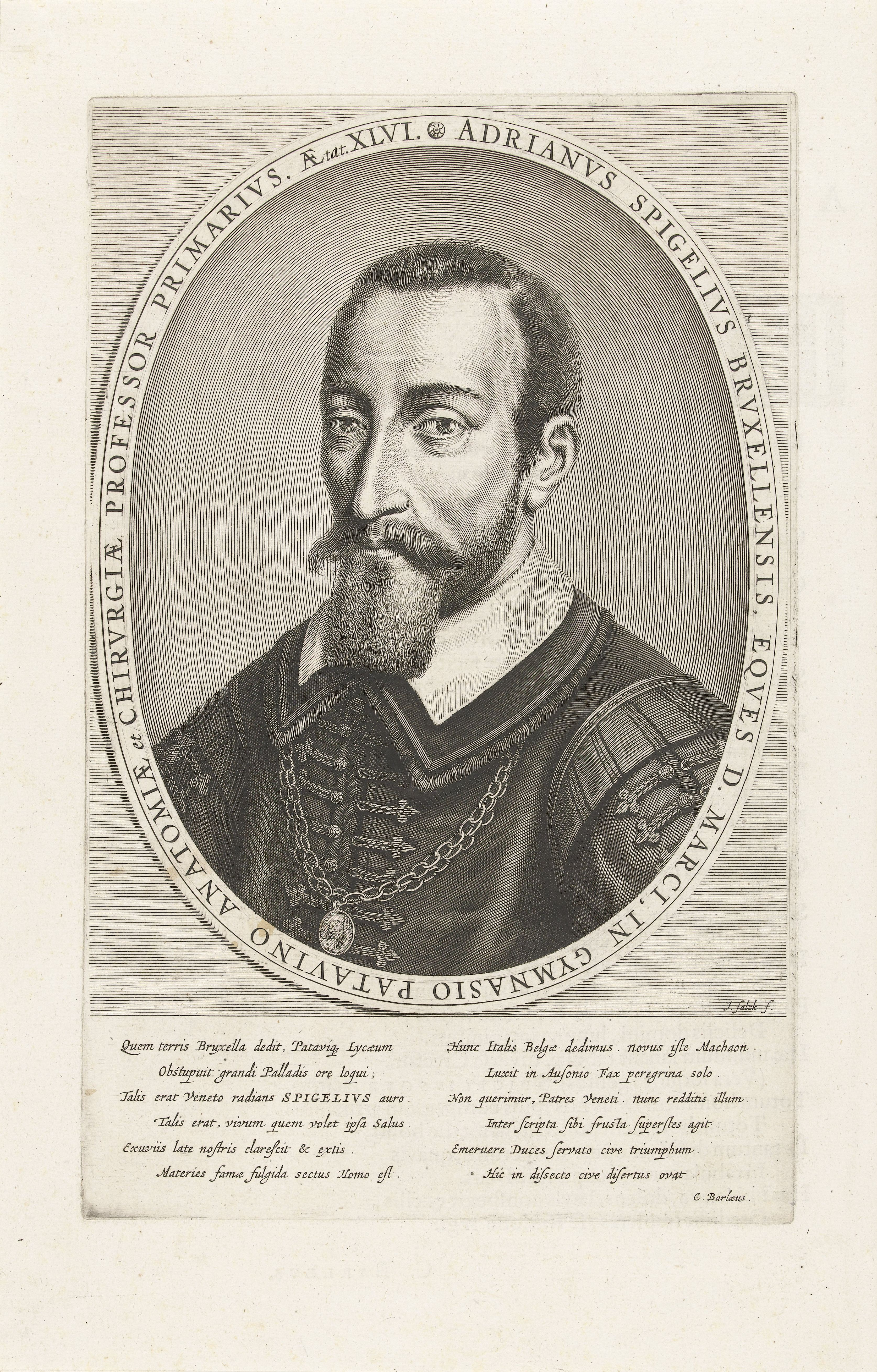 IdentificatieTitel(s): Portret van Adriaan van den SpiegelAdrianvs Spigelivs (titel op object)Objecttype: prent Objectnummer: RP-P-1910-1780Catalogusreferentie: Hollstein Dutch 282Block 282-2(2)Opschriften / Merken: verzamelaarsmerk, verso, gestempeld: Lugt 2228Omschrijving: Busteportret van de Vlaamse anatoom, chirurg en plantkundige Adriaan van den Spiegel. Afgebeeld met ketting Waar: aan een insigne van de orde van San Marco. In ovale omlijsting met opschrift en onderschrift in Latijn. Op de verso zijde een vers in Latijn van 44 regels.VervaardigingVervaardiger: prentmaker: Jeremias Falck (vermeld op object)schrijver: Caspar van Baerle (vermeld op object)Plaats vervaardiging: Amsterdam (mogelijk)Datering: 1645Fysieke kenmerken: gravureMateriaal: papier Techniek: graveren (drukprocedé)Afmetingen: plaatrand: h 310 mm × b 197 mmOnderwerpWie: Adriaan van den SpiegelVerwerving en rechtenVerwerving: aankoop 1910Copyright: Publiek domein